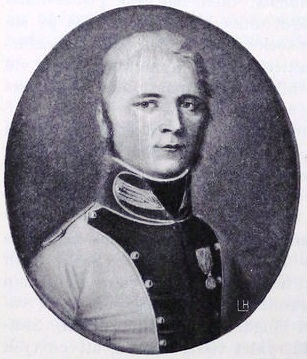 Carl Wilhelm Malm